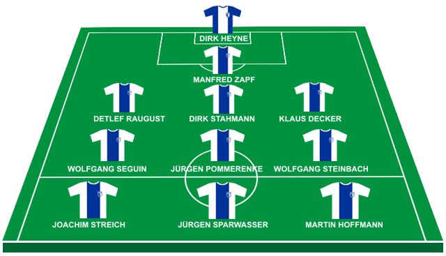 Traumelf der 1. FC Magdeburg von 1965-2000, gewählt von den Fans des 1. FC Magdeburg im Frühjahr 2001